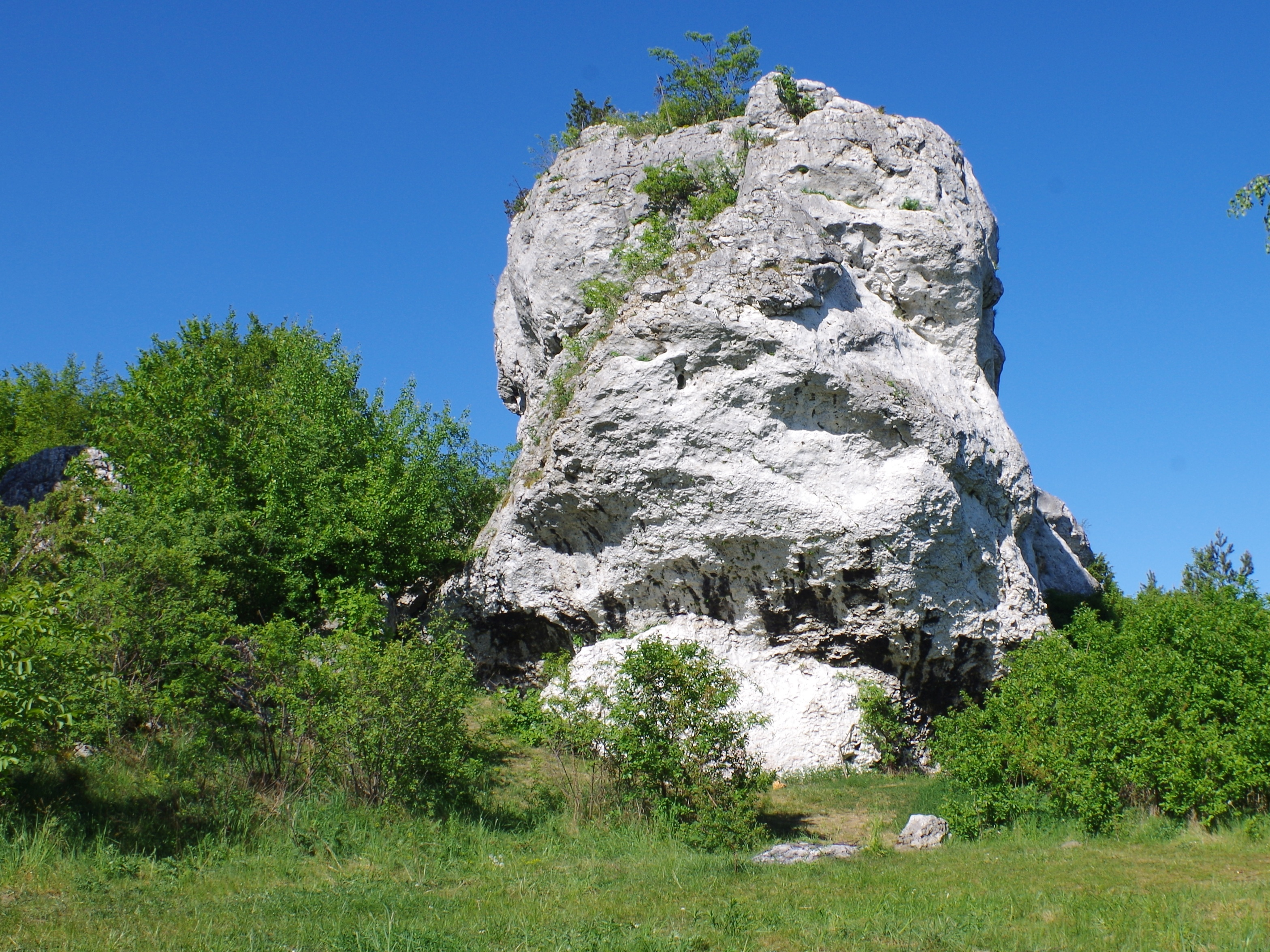 Turnia Szefa w Skałach Rzędkowickich. Widok od południa